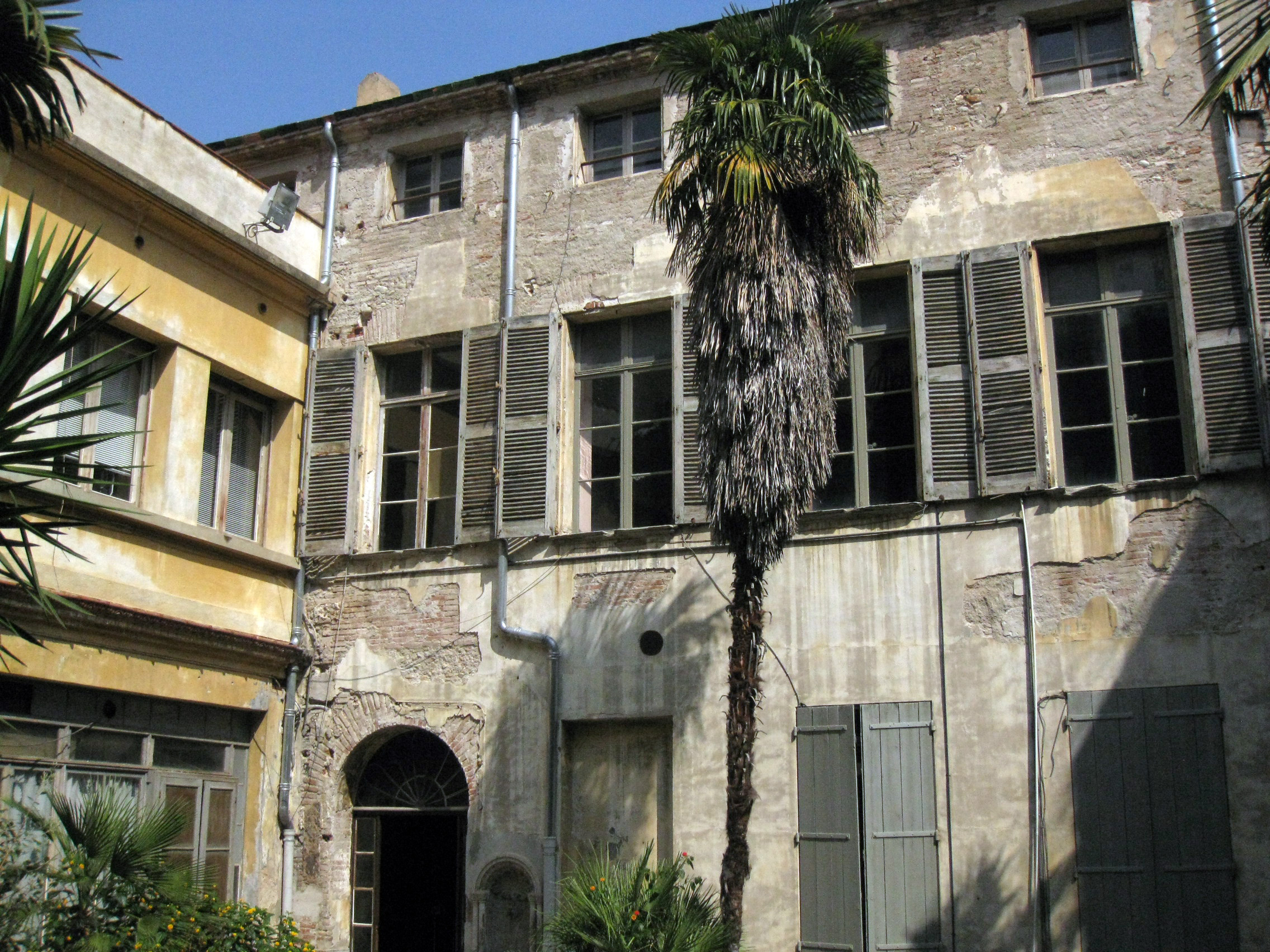 Casa de Bernat Xanxo (Perpinyà), vista del pati, molt deteriorat .